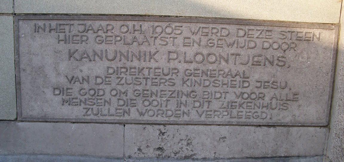 Eerste steen van de nieuwe vleugel van het Heilig Hart uit 1965, aangebracht aan de hoofdingang - Eeklo - Oost-Vlaanderen - België